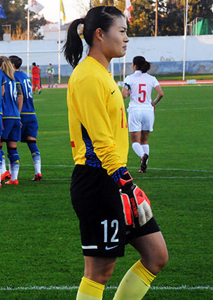 a_57_6776